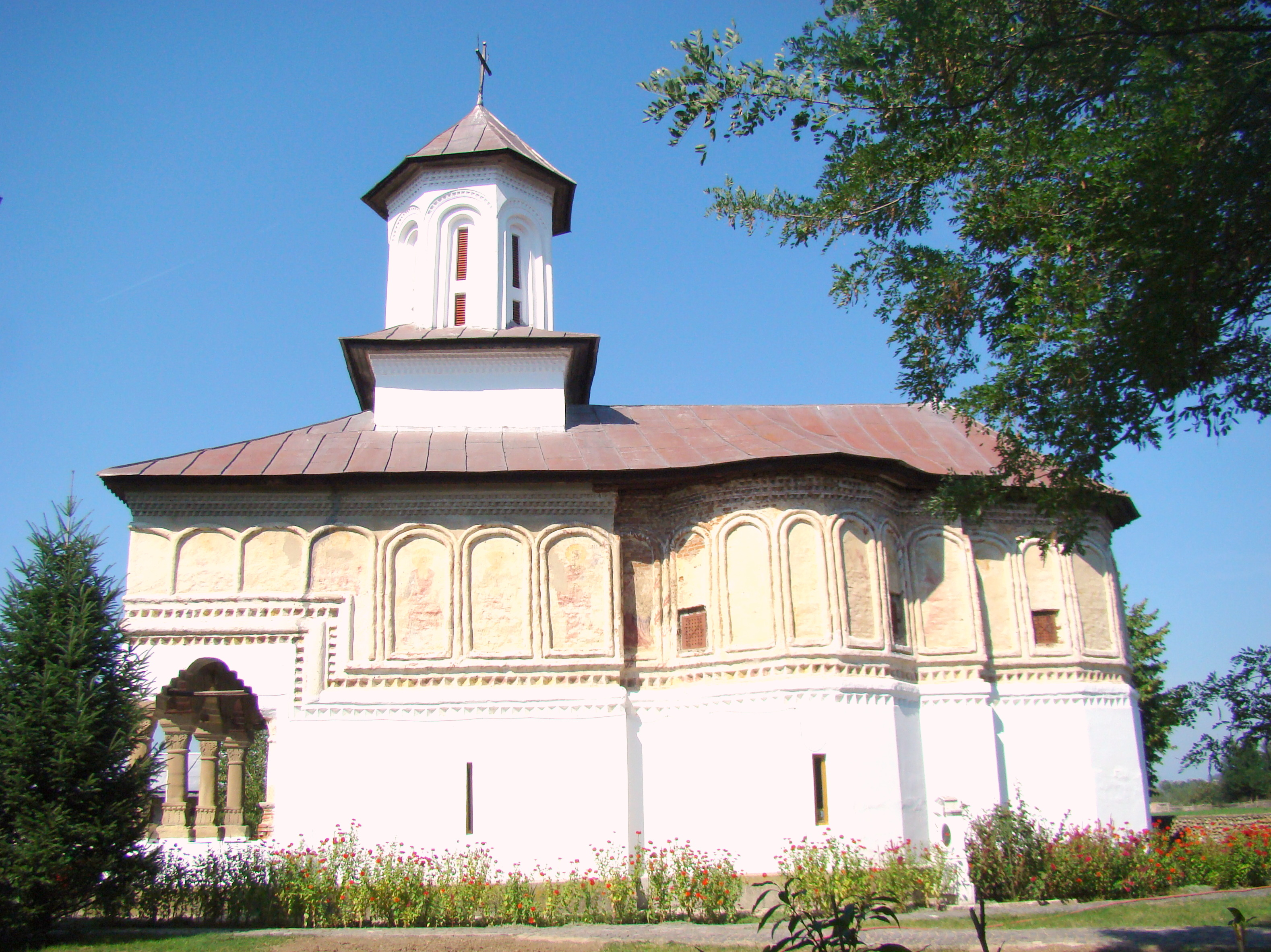 Mănăstirea „Sfântul Ioan Botezătorul” (Cămărăşeasca), oraș Târgu Cărbunești, str. Mitropolit Nestor Vornicescu 6